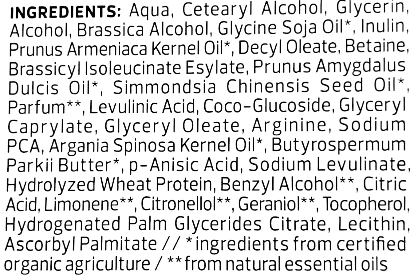 Ingredients INCI Haarkur